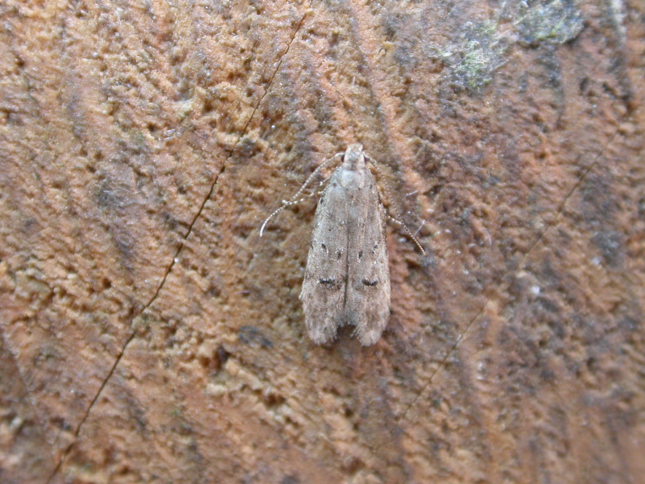 Teleiodes vulgella, to MV light, Hellerup, Denmark, 31 July 2003